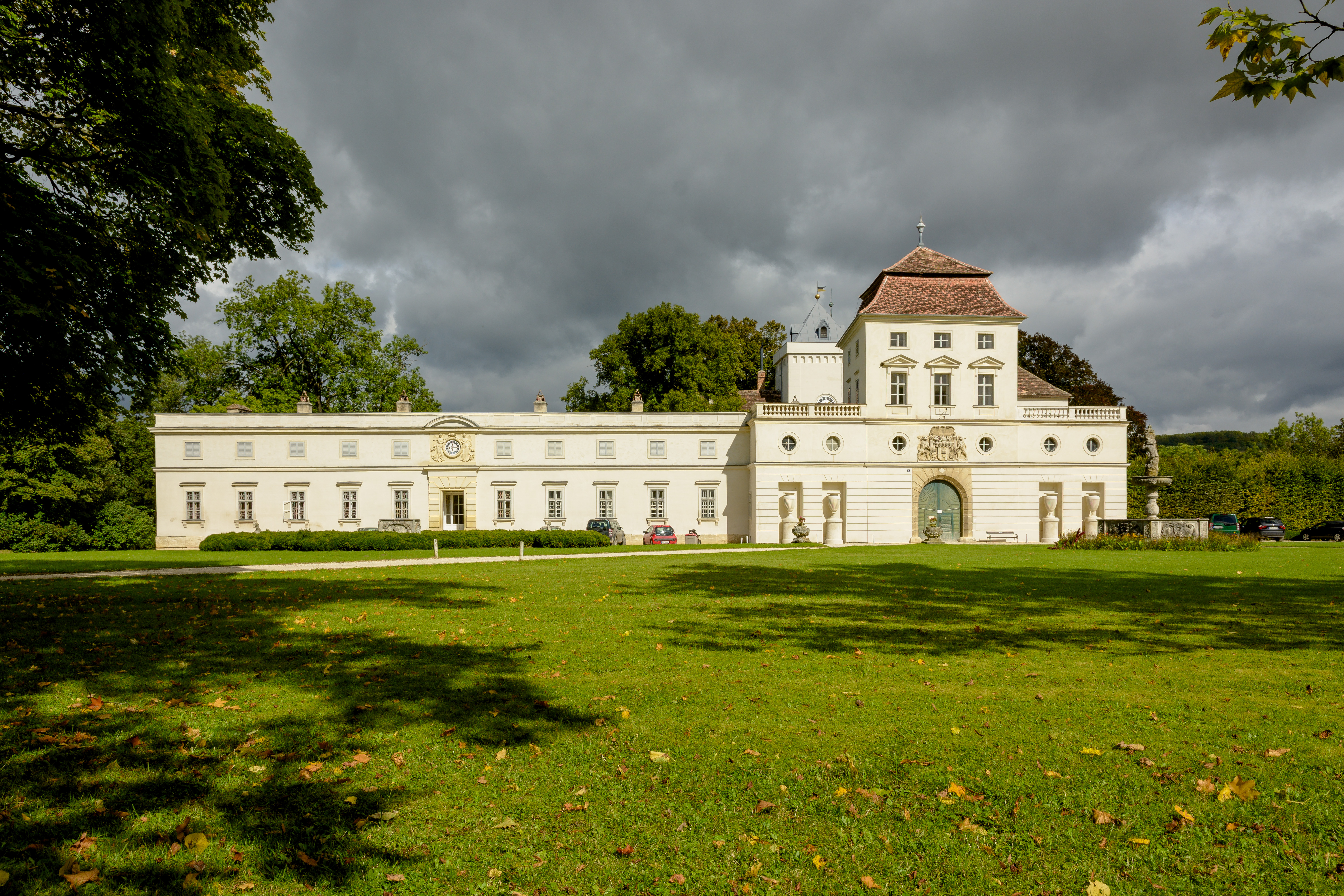 Schloss Ernstbrunn